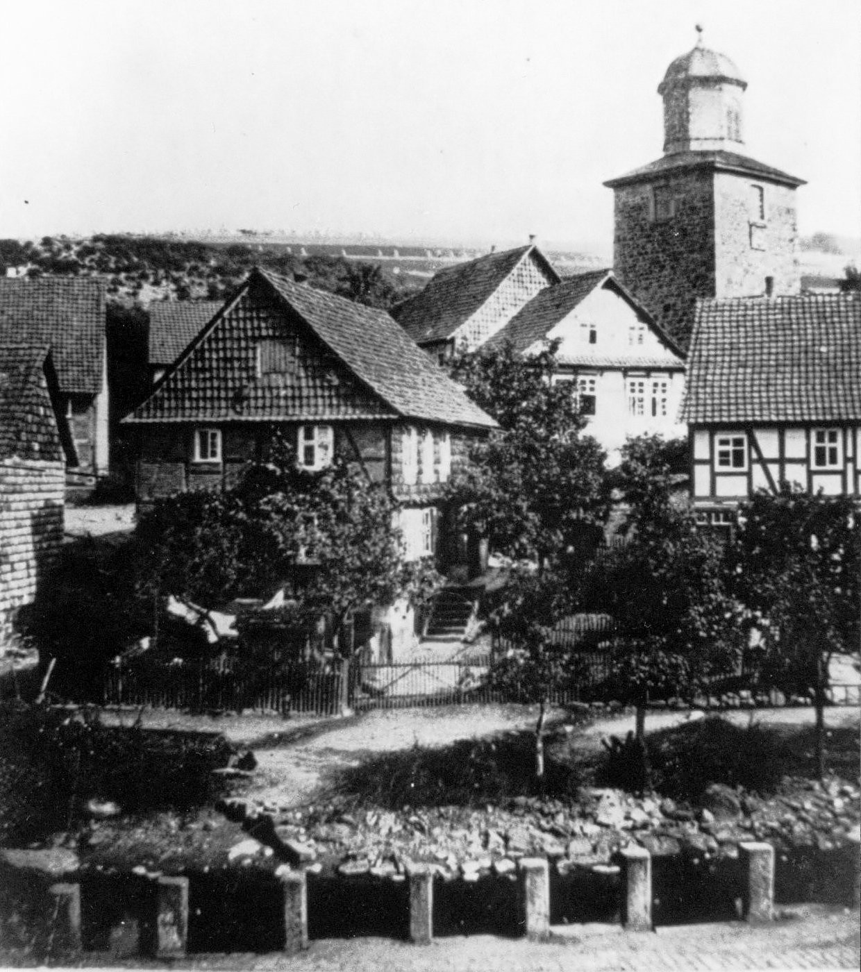 Das Bild zeigt im Vordergrund in der Ortslage Trubenhausens die Abgrenzung der L 3238 zur Gelster (Fluss) mittels massiver, gestockter Sandsteinquader